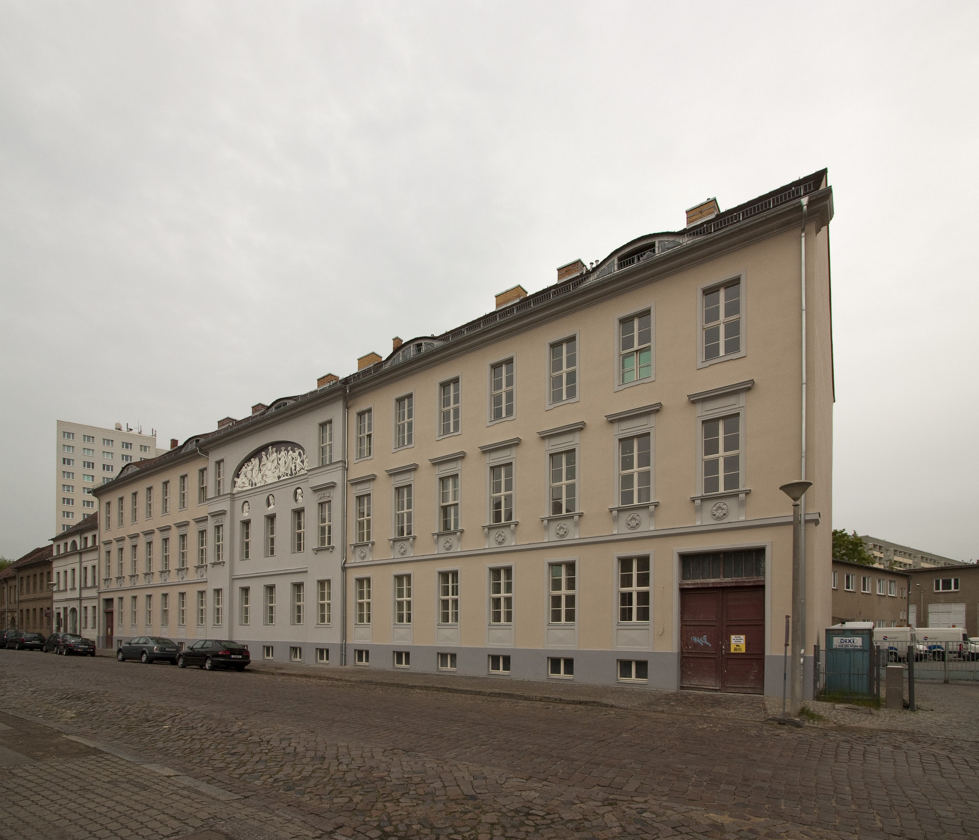 Schauspielerkaserne Potsdam - Ansicht